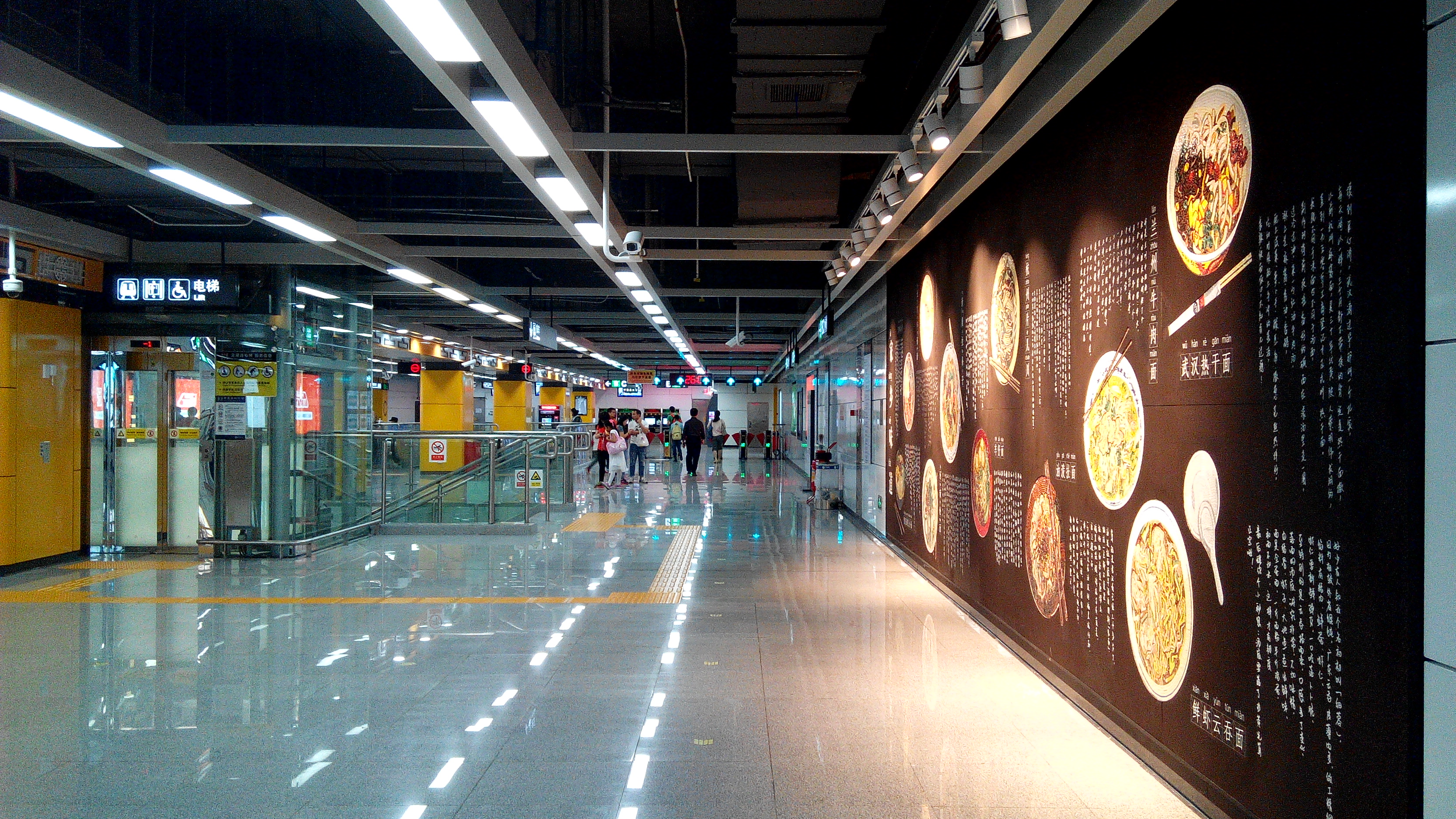 深圳地铁9号线 园岭站大堂